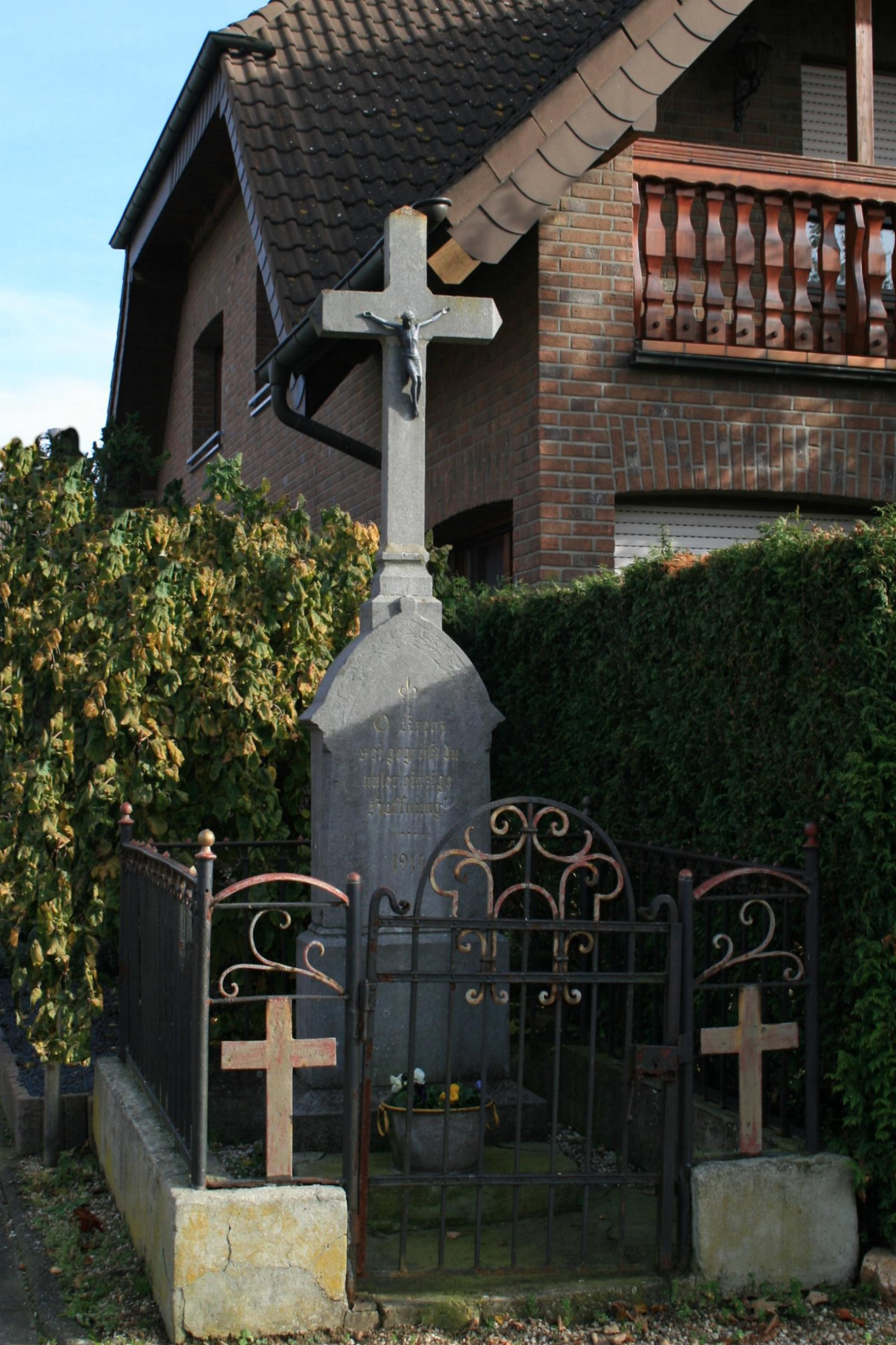 Wegekreuz in der Dorfstr. in Nörvenich-Poll